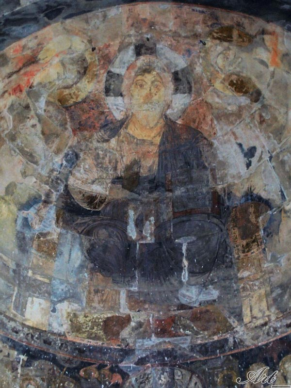 Ахпат_004